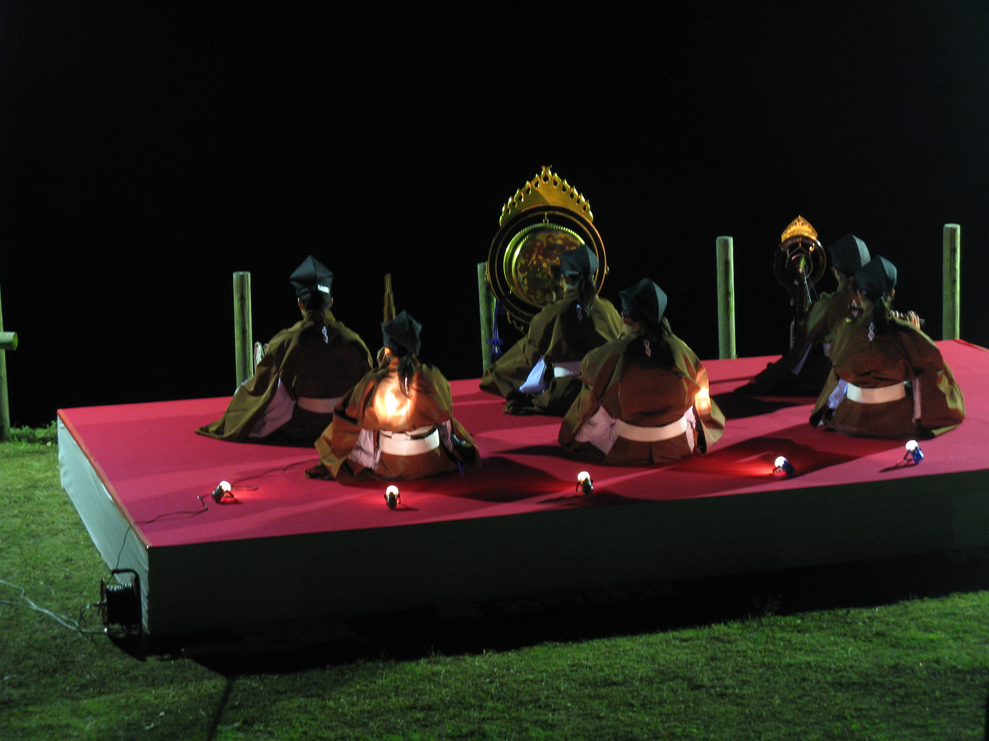 雅楽（大阪府千早赤阪村・棚田夢灯り2010にて）